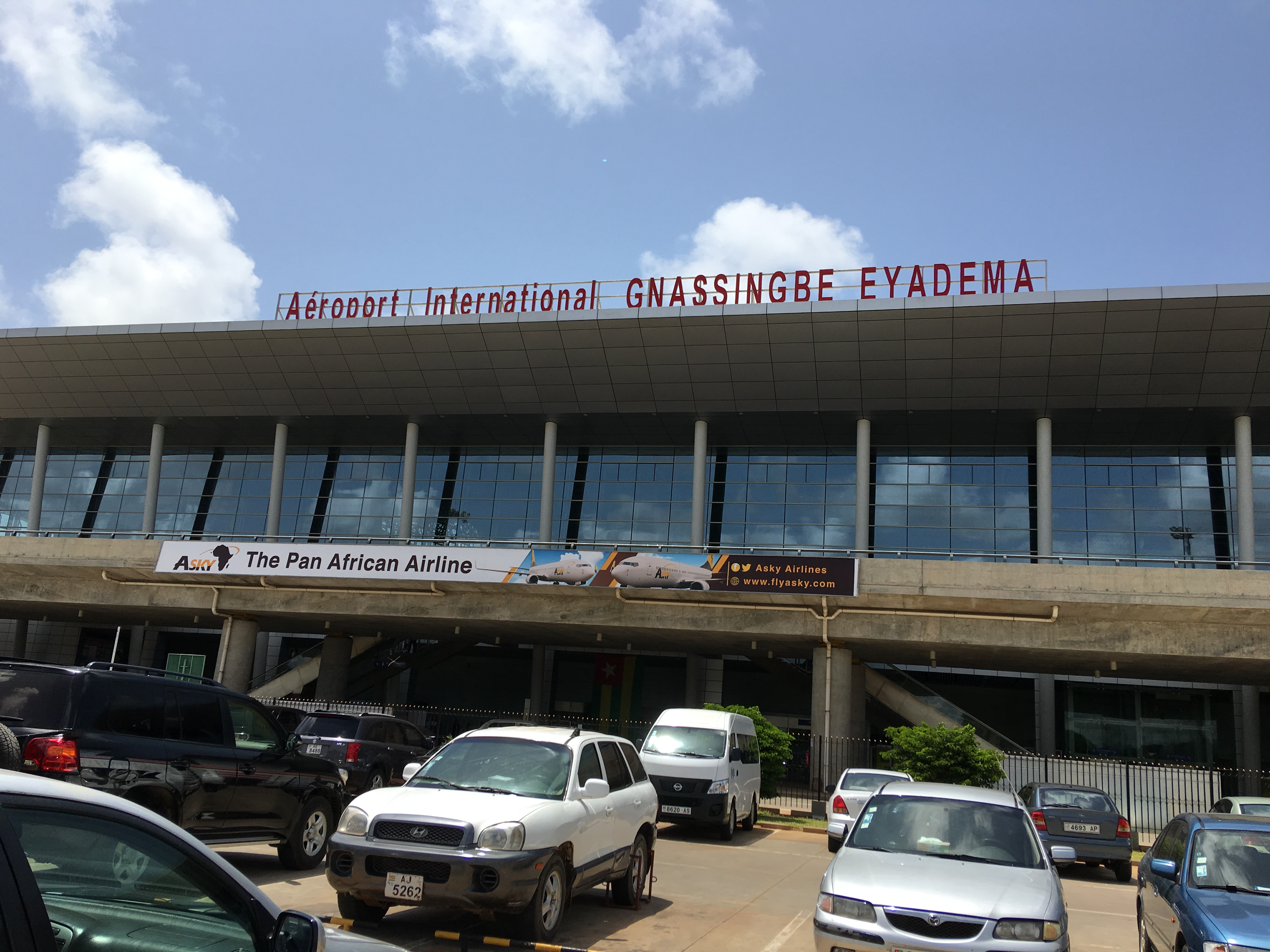 Façade de l'Aéroport international Gnassingbé Eyadéma de Lomé vue du parking